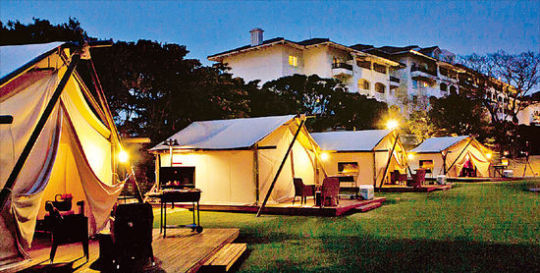 글램핑장의 모습이다.